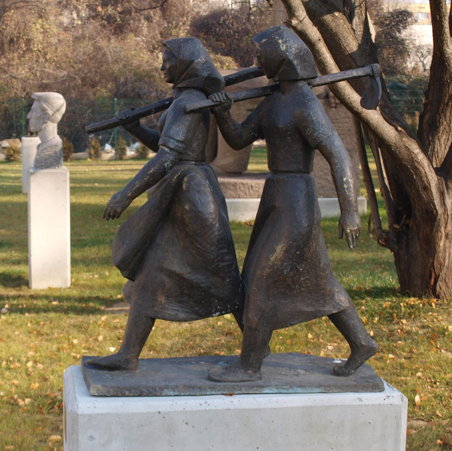 Скулптури в парка на Музея на социалистическото изкуство в София - кооператорки от ТКЗС.